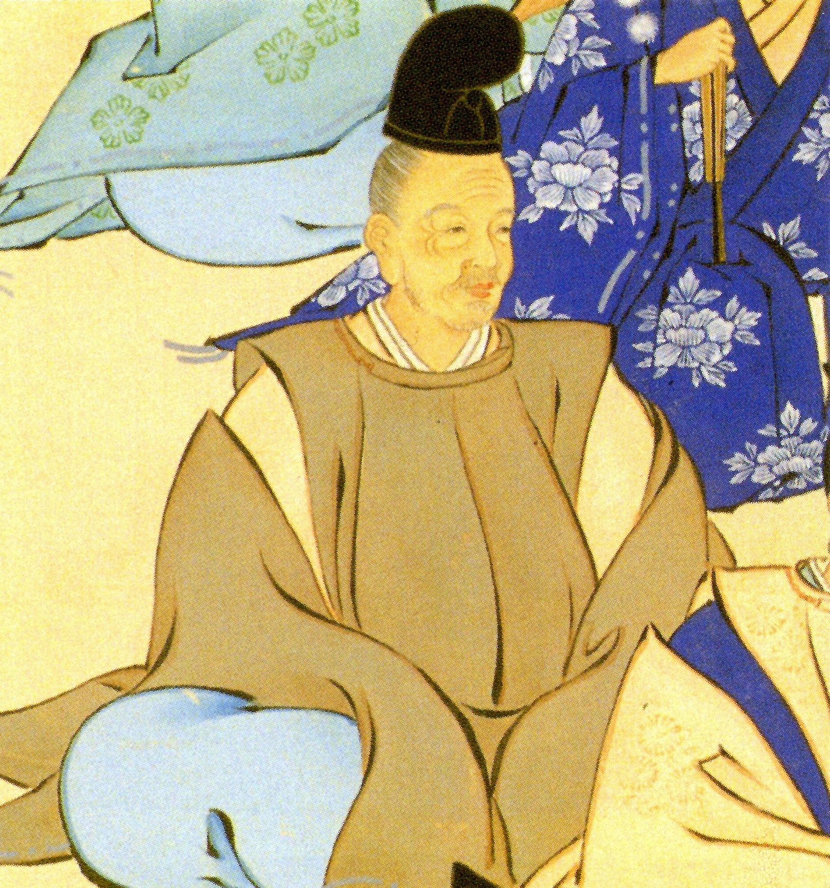 津軽信寿の肖像。